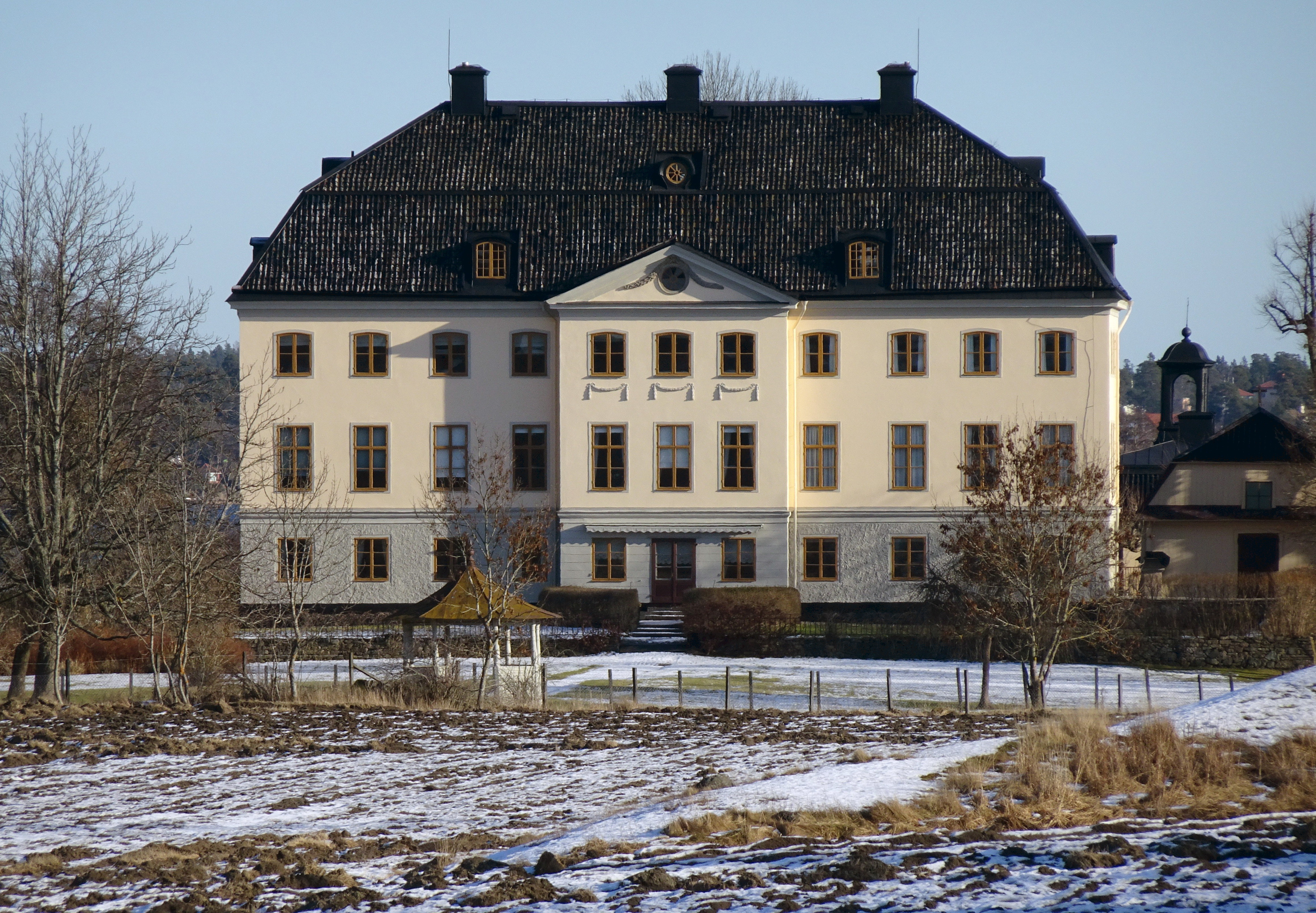 Erstaviks herrgård